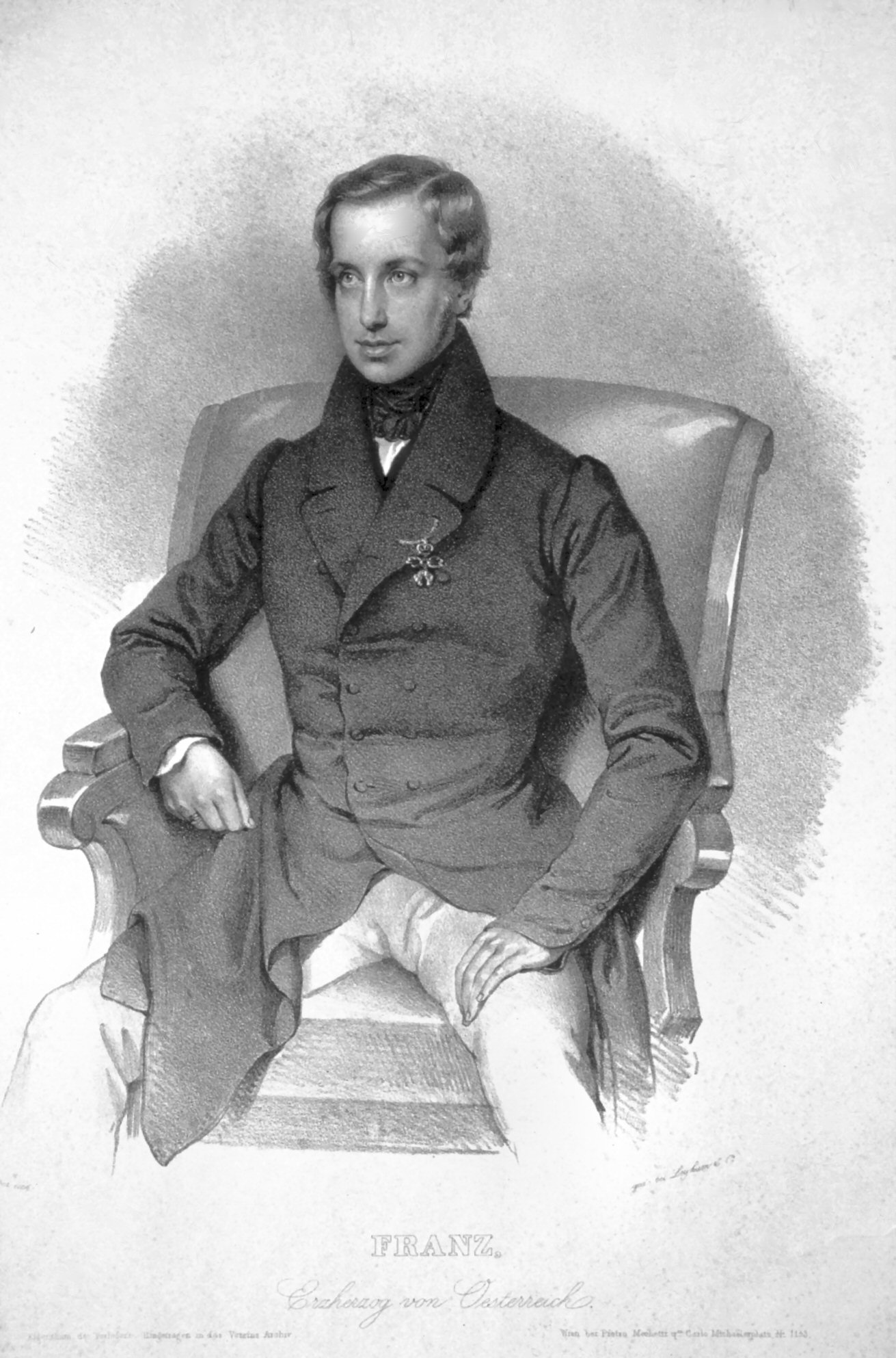 Franz Karl von Österreich (1802-1878), Erzherzog, Vater des Kaisers Franz Joseph.